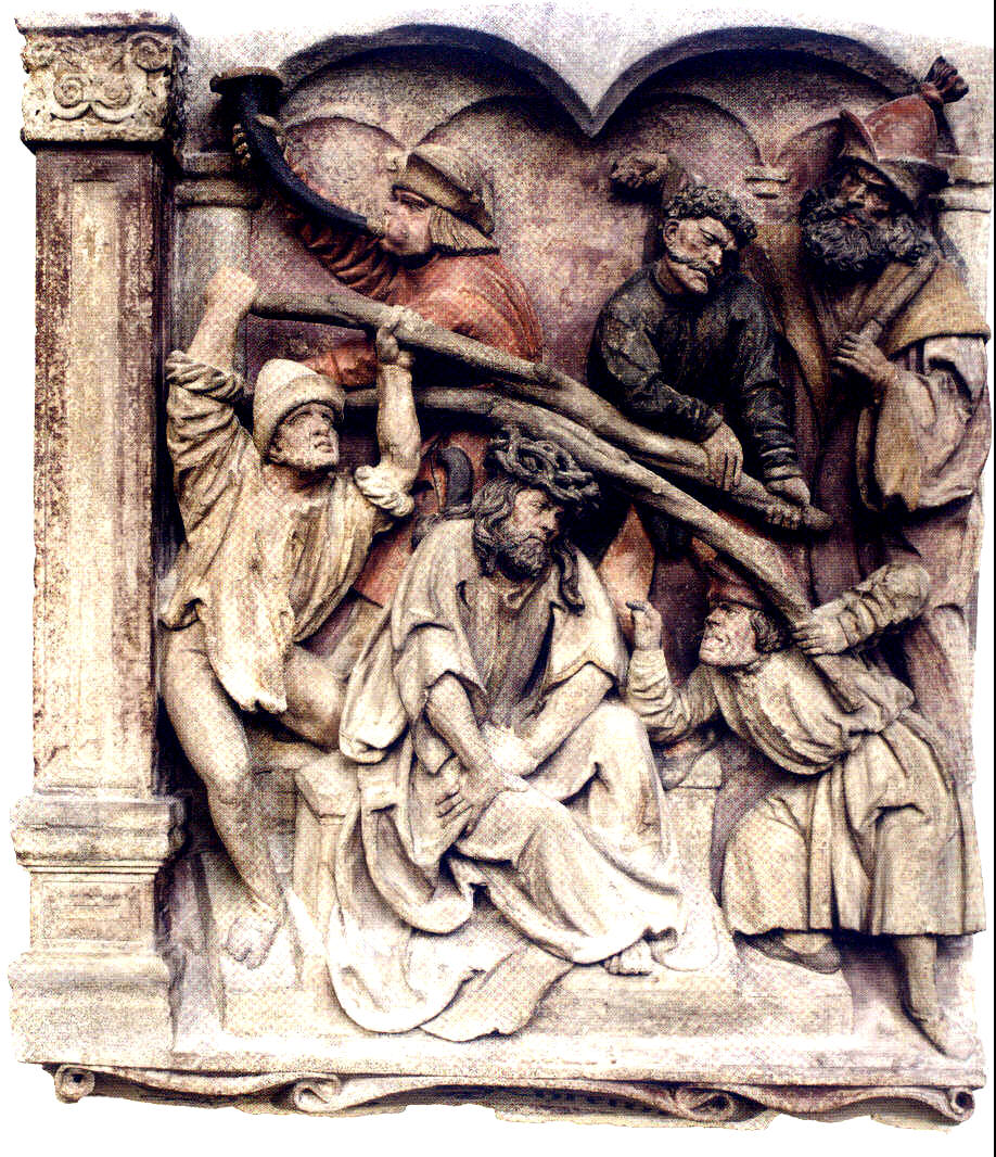 Passionsrelief Dornenkrönung im Stephansdom zu Wien